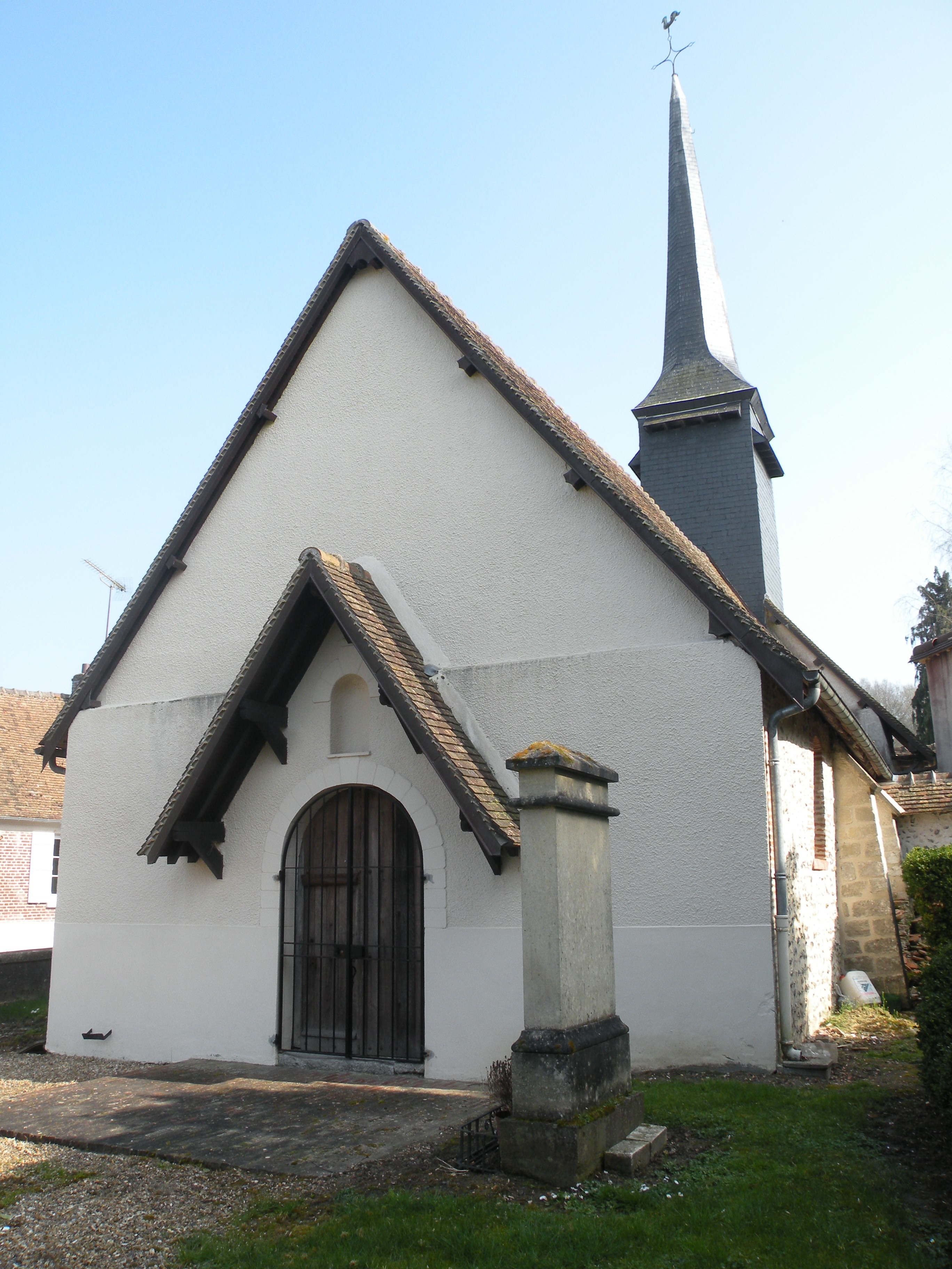 Villers-sur-Trie